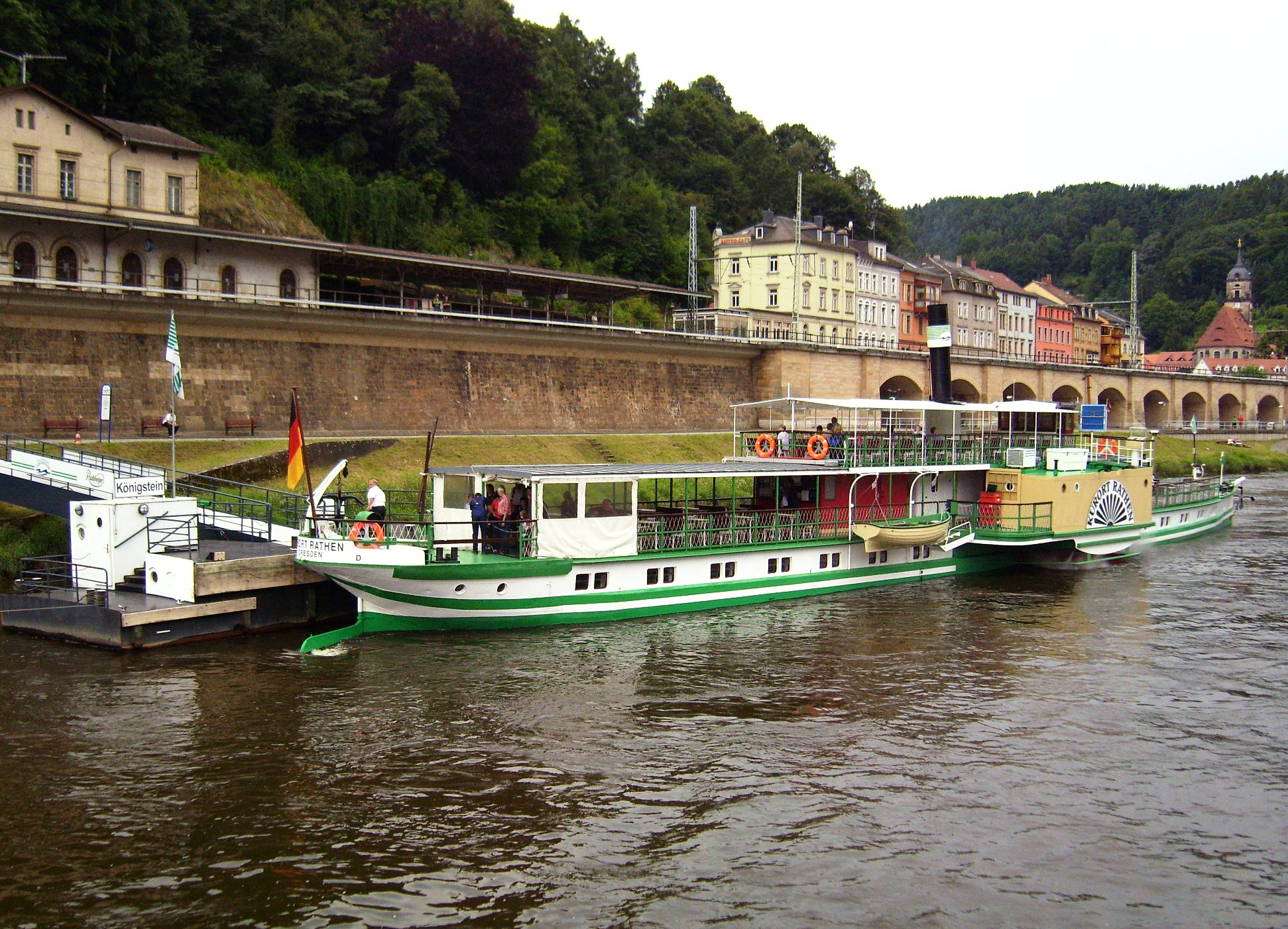 RaddampferKurort Rathen (Bauj. 1896) in Königstein an der Elbe